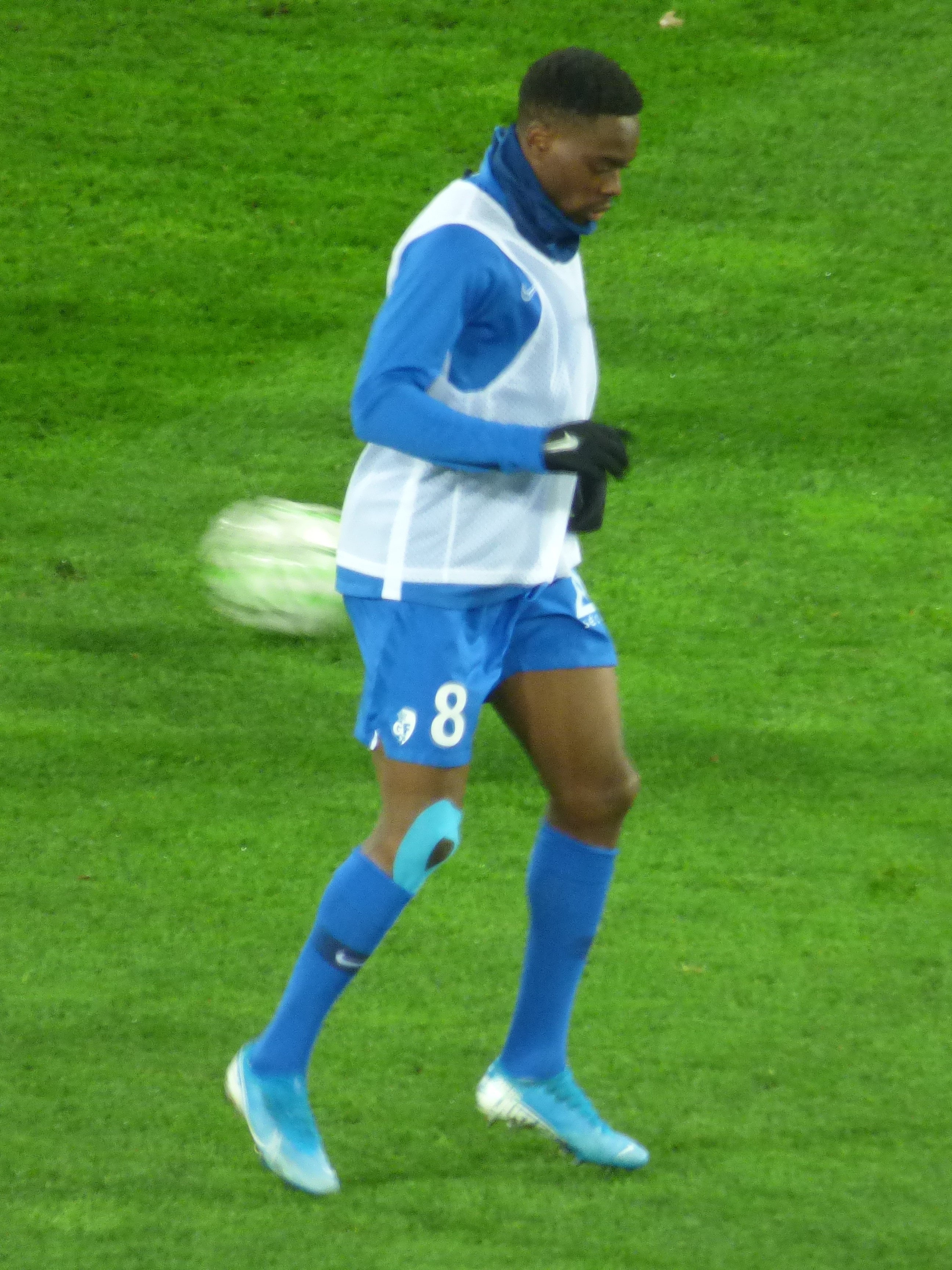 Jonathan Tinhan lors du match RC Lens / Grenoble Foot 38, le 10 février 2020, comptant pour la vingt-quatrième journée du championnat de France de football de Ligue 2 2019-2020, au Stade Bollaert-Delelis.